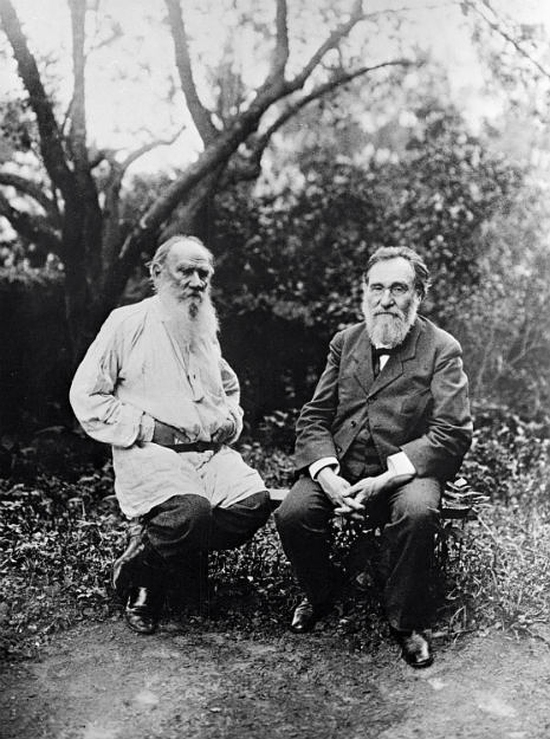 Граф Лев Николаевич Толстой и профессор Илья Ильич Мечников на лоне природы